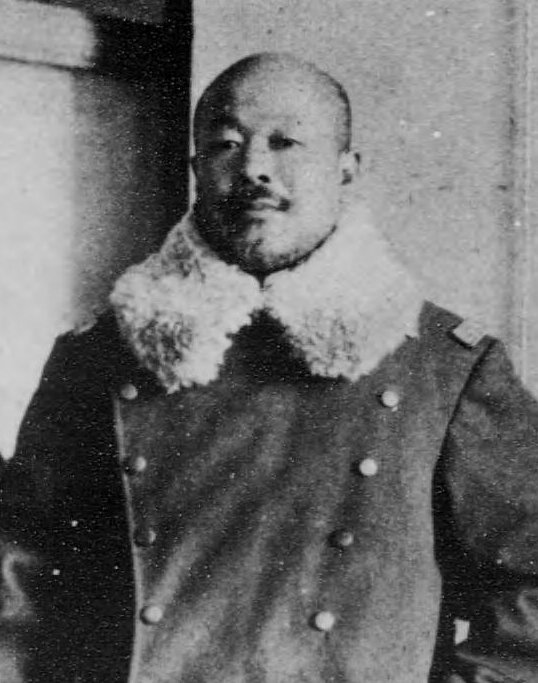 大井成元（1863-1951）